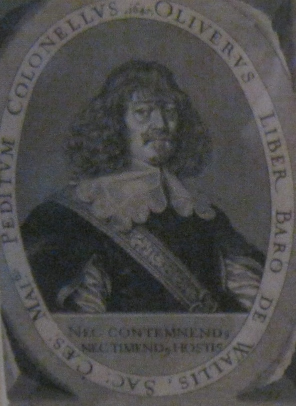 kopergravure van Elias Widemann